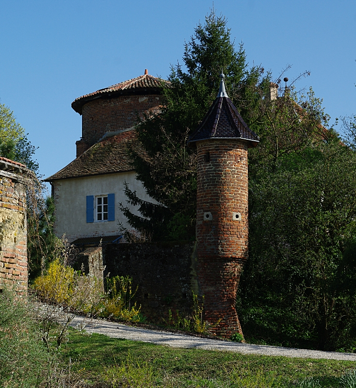 Dans la Dombes, ain